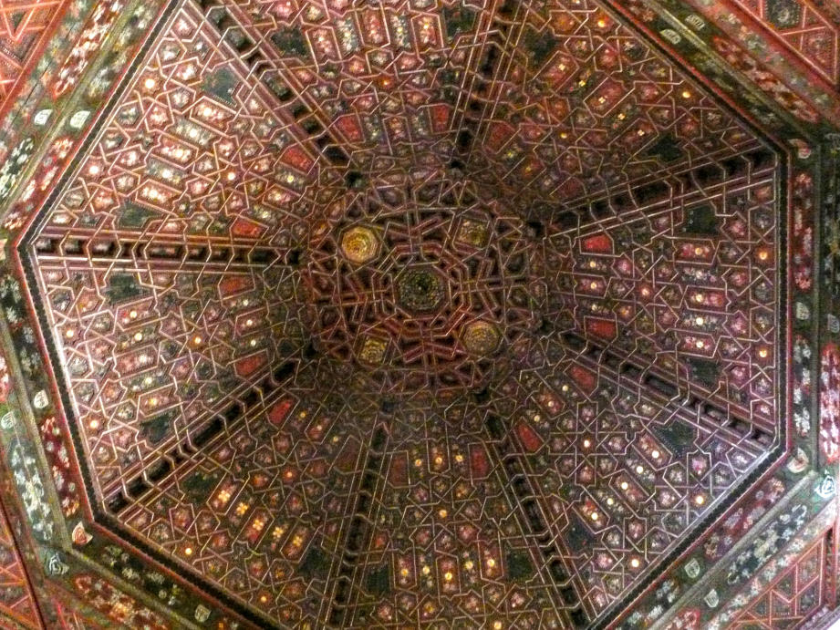 Benavente Mudejardecke im Schneckenturm